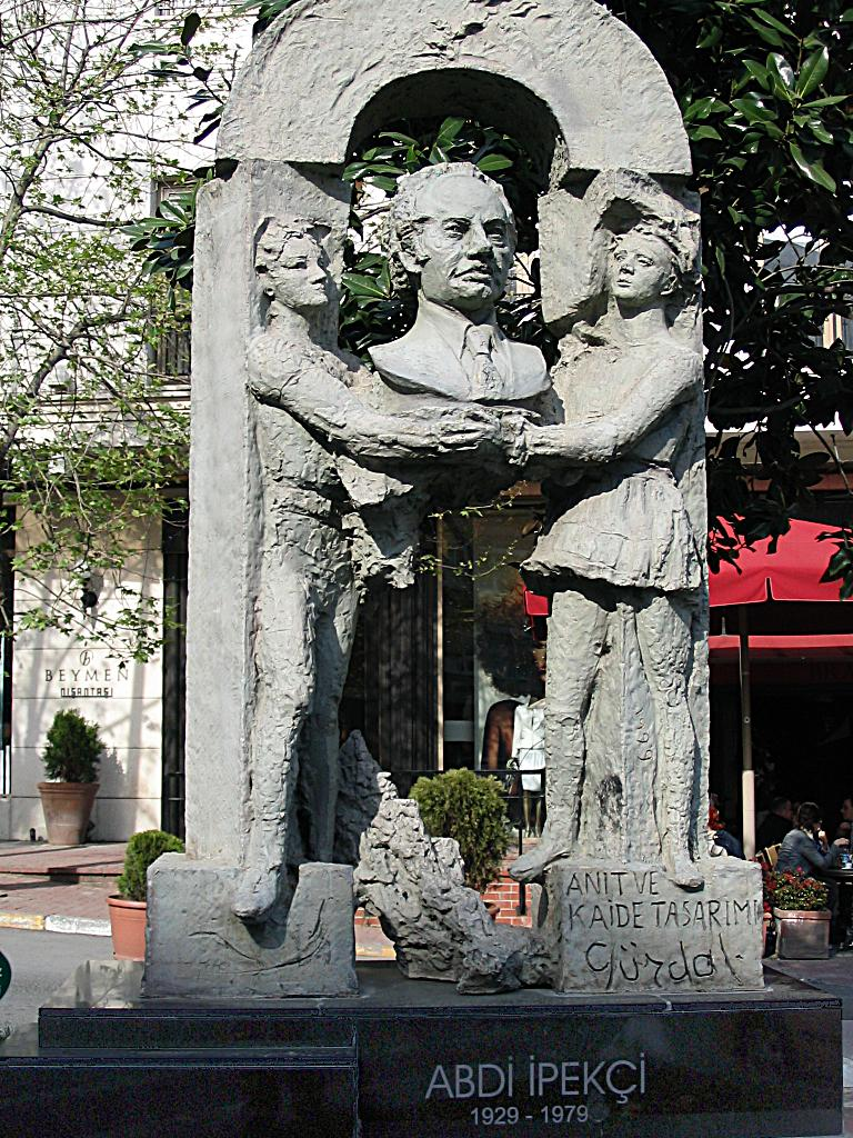 Memorial sculpture for Abdi İpekçi on Abdi İpekçi Caddesi, İstanbul by sculptor Gürdal Duyar